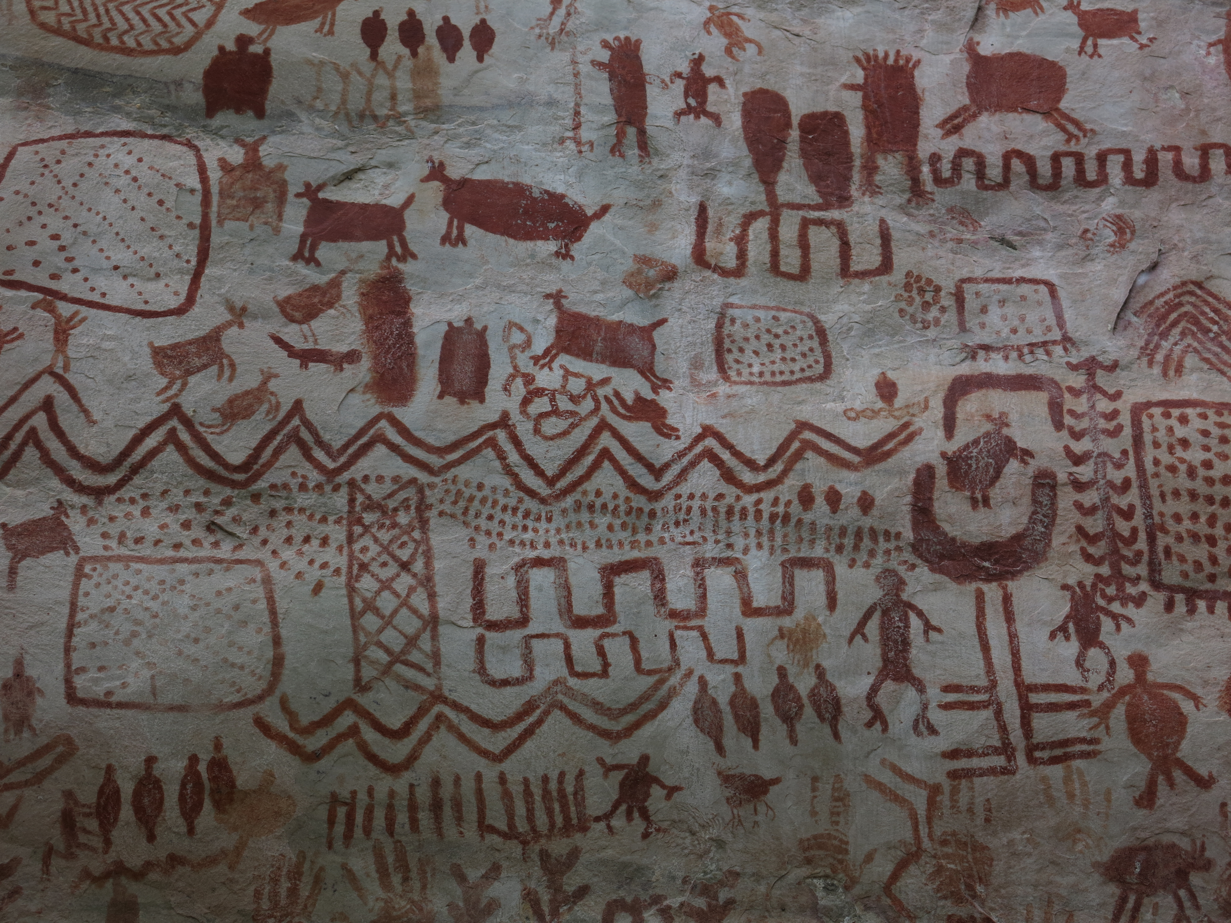 Pinturas rupestres de los Nukak Esta fotografía fue tomada en un área protegida de Colombia con el código 1386 del RUNAP.